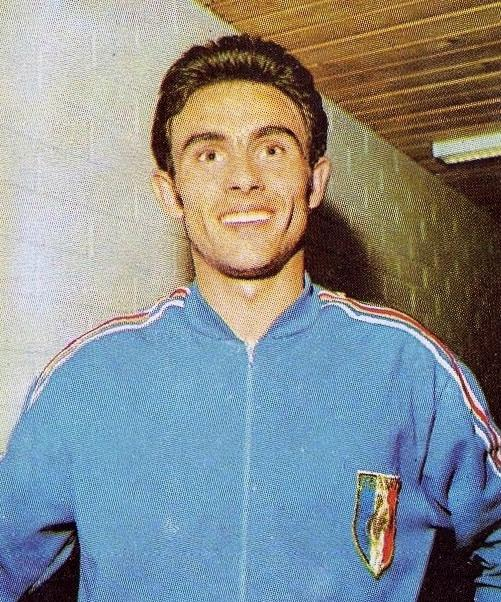 MUNCHEN/MONACO '72-PANINI-Figurina n.74- VILLAIN - FRANCIA -ATLETICA LEGG.-Rec